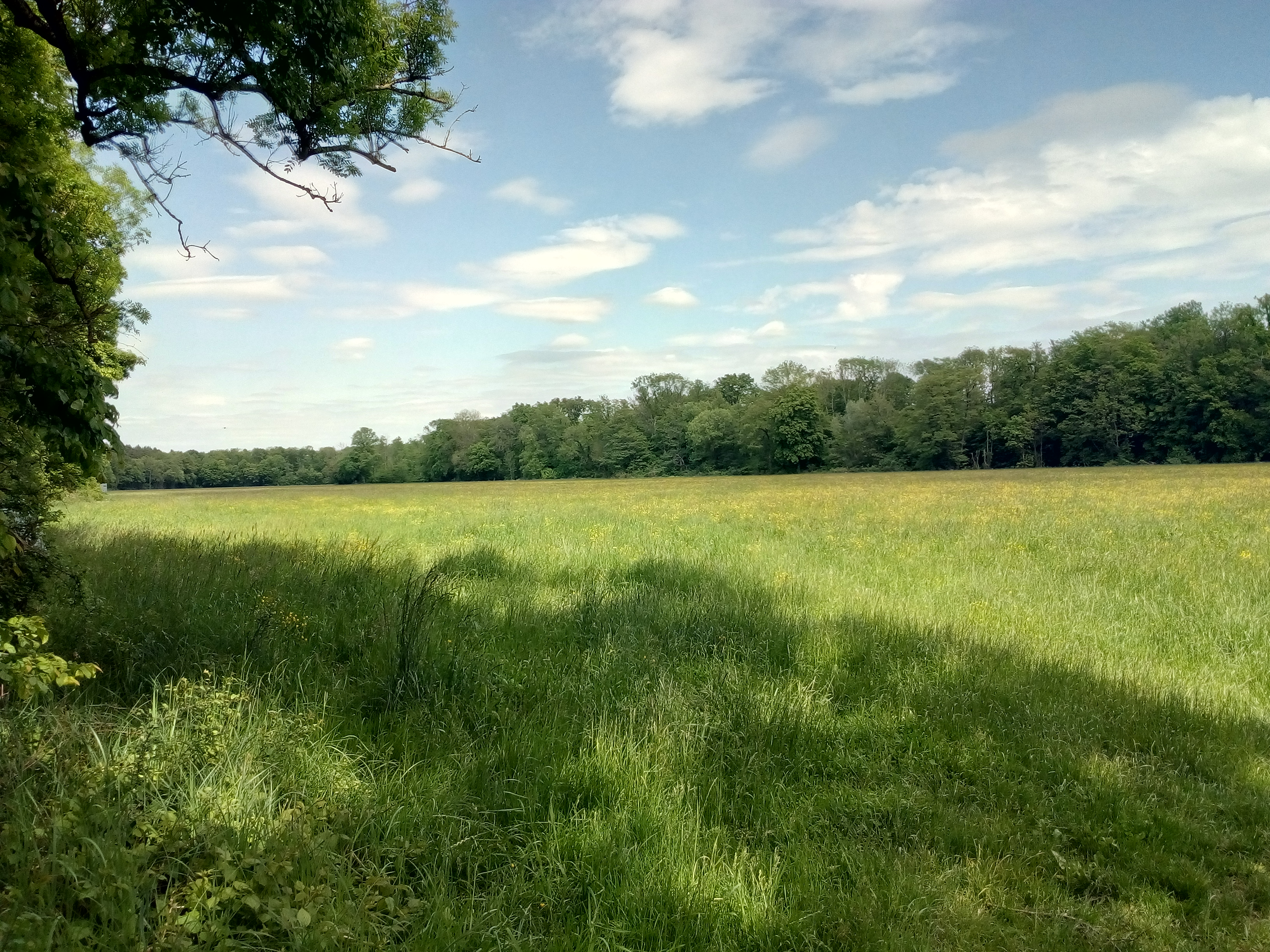 Wiesen am Otterbach im Naturschutzgebiet Bruchbach-Otterbachniederung östlich von Kandel